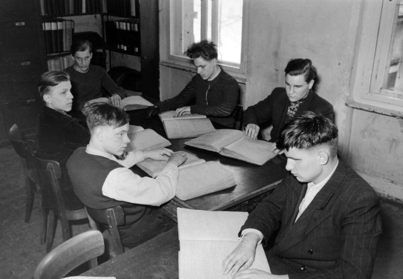 Blindenstudienanstalt Marburg/Lahn Beim Deutschunterricht. Es wird vorgelesen. Jeder verfolgt den Text mit seinen Fingern.